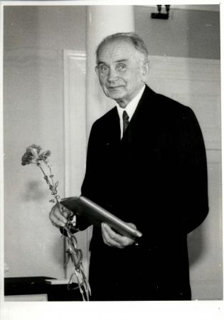 Keeleteadlane Arnold Kask 70. sünnipäeval (1972)